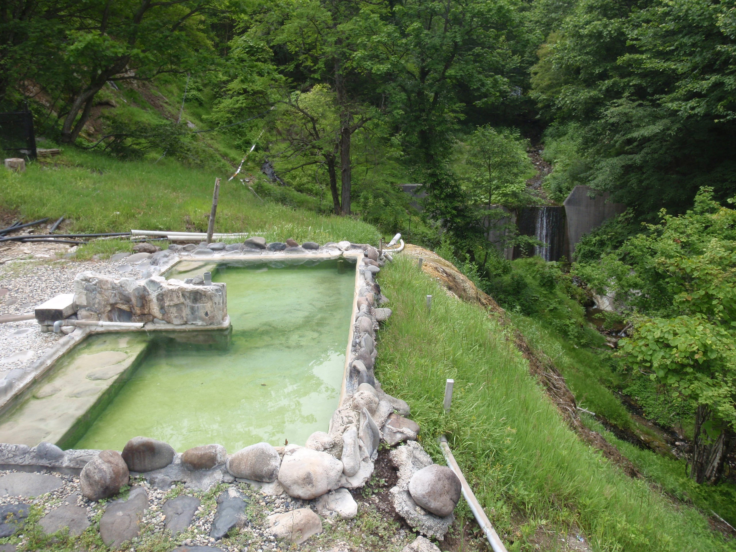 幌加温泉、鹿の谷、混浴露天風呂